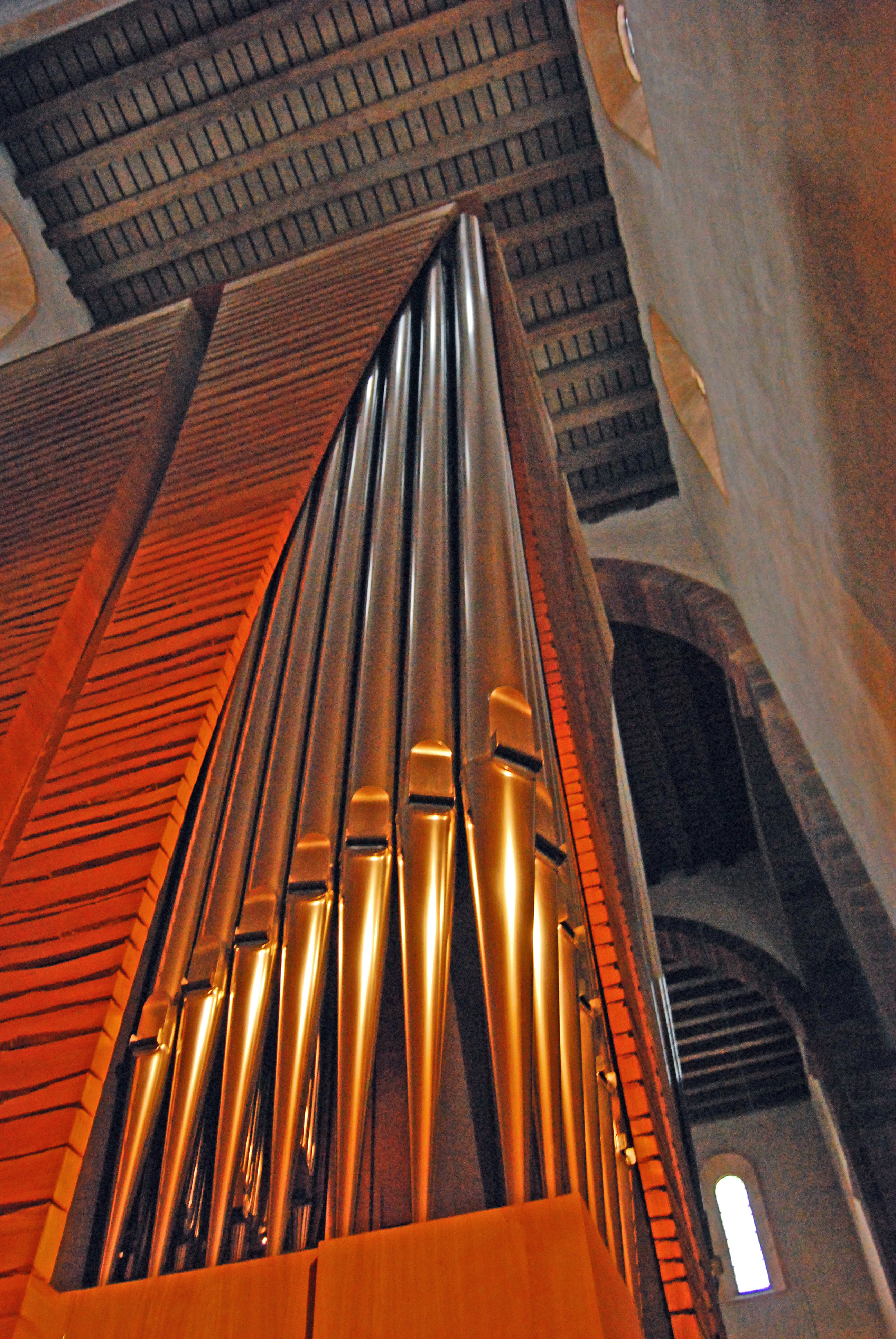 Kloster Alpirsbach, Orgel